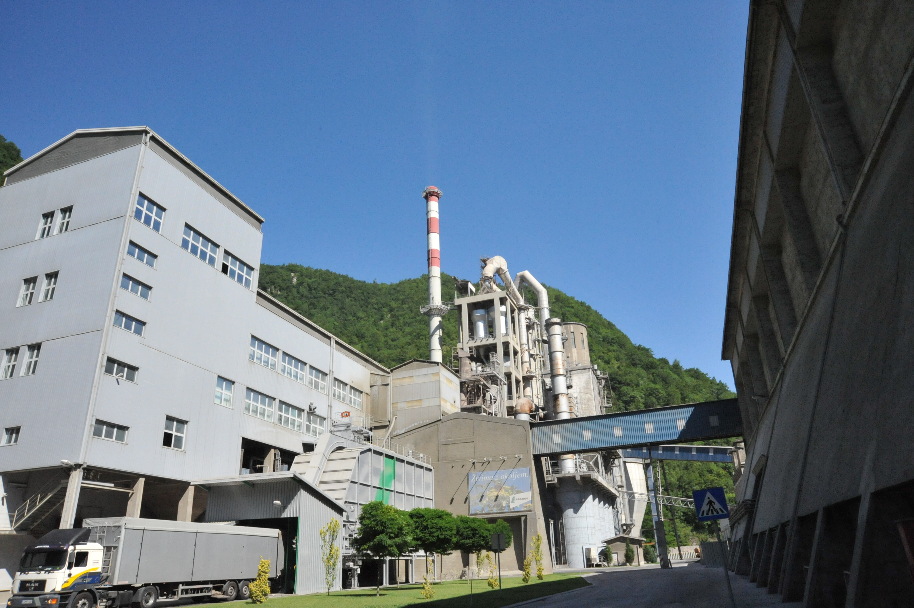 Notranjost tovarne